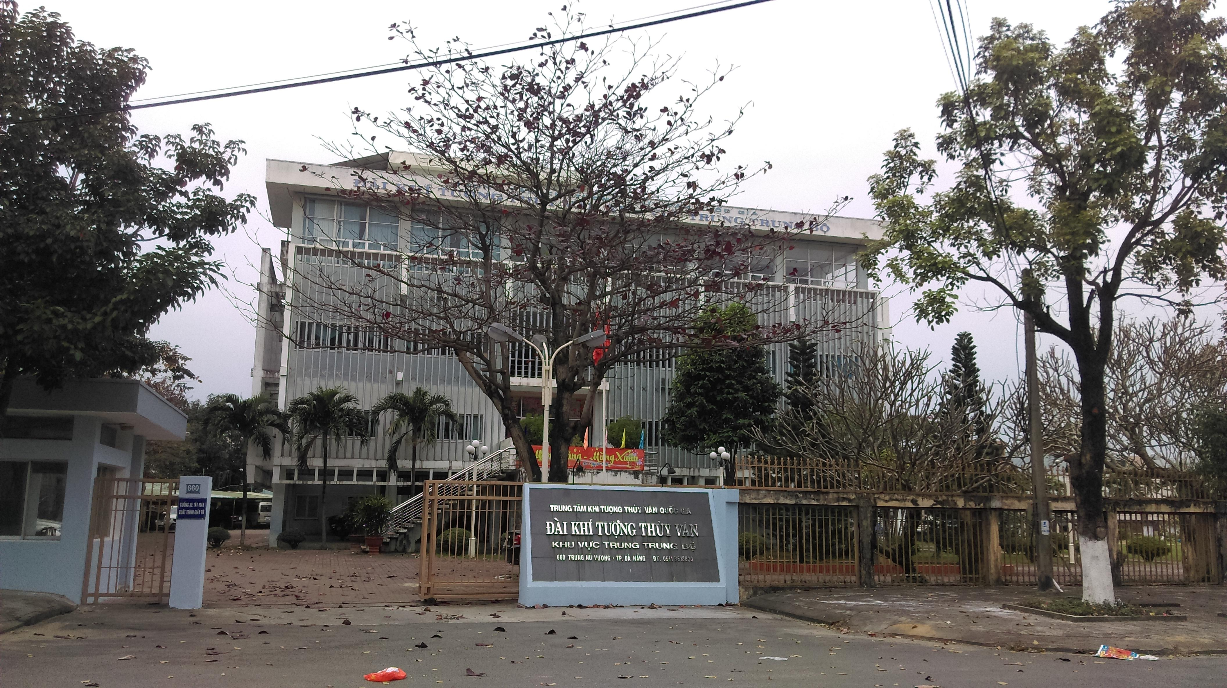 Đài Khí tượng Thủy văn Khu vực Trung Trung Bộ, Đà Nẵng